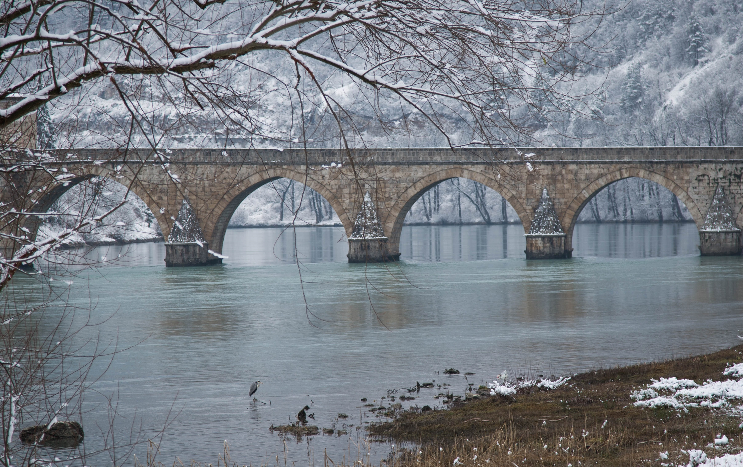 Most Mehmed-paše Sokolovića u Višegradu This image was uploaded as part of Trace of Soul 2018.